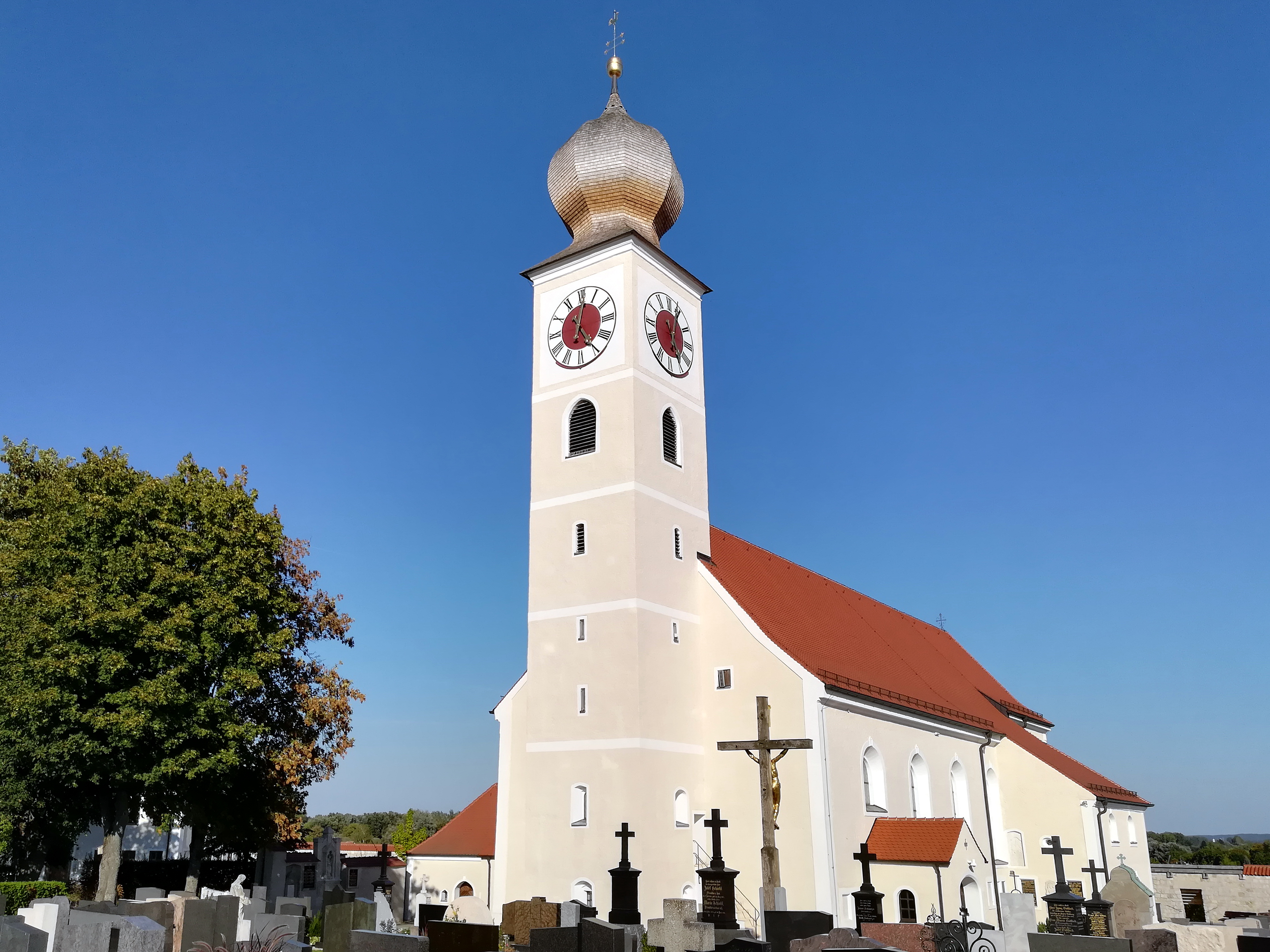 Katholische Pfarrkirche St. Petrus in Vohburg an der Donau.